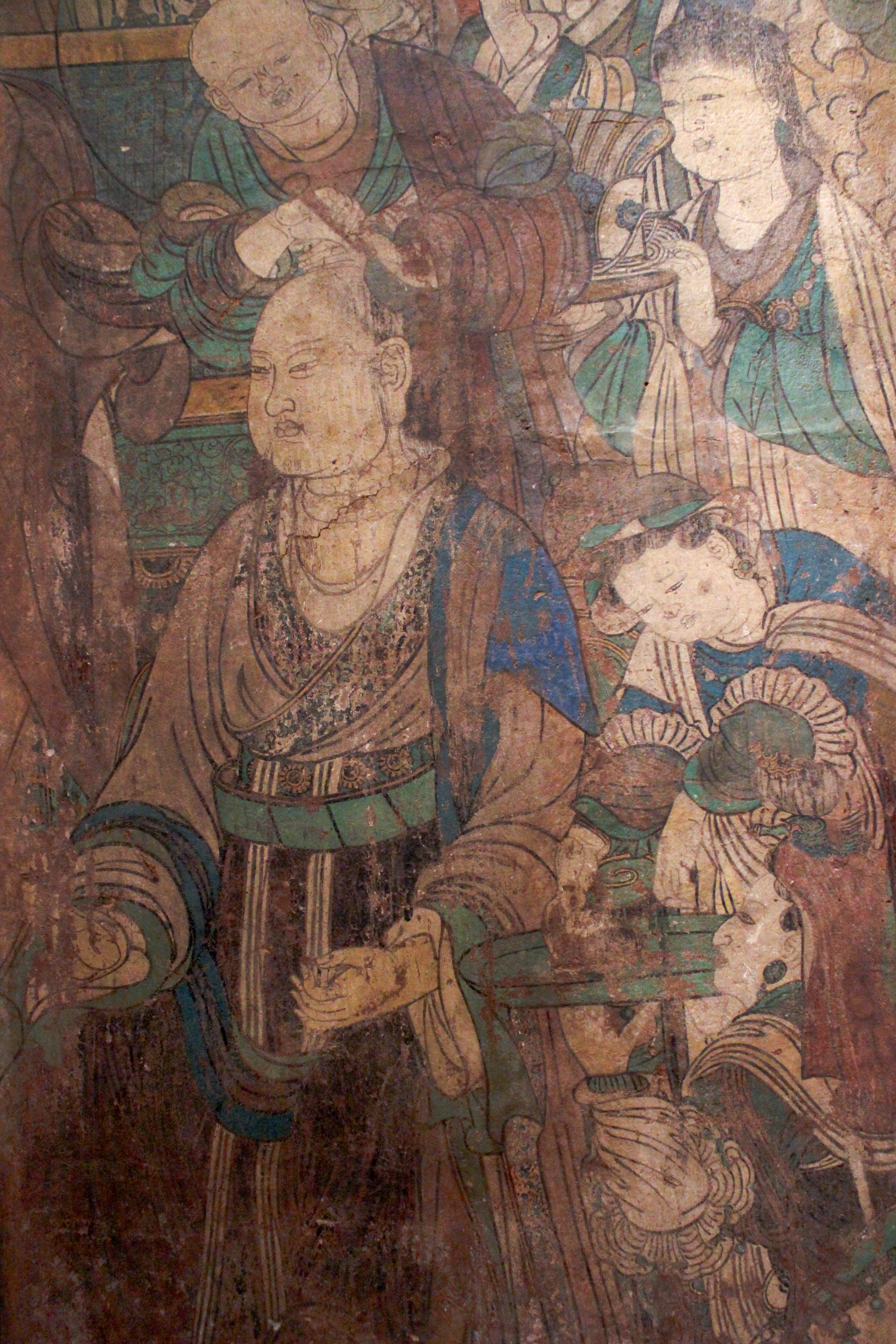 Entrée de l'empereur Wu des Liang dans la communauté bouddhique. Peinture murale de la dynastie Ming, v. XVe-XVIe siècles, provenant de Chine du Nord (Shanxi ?).